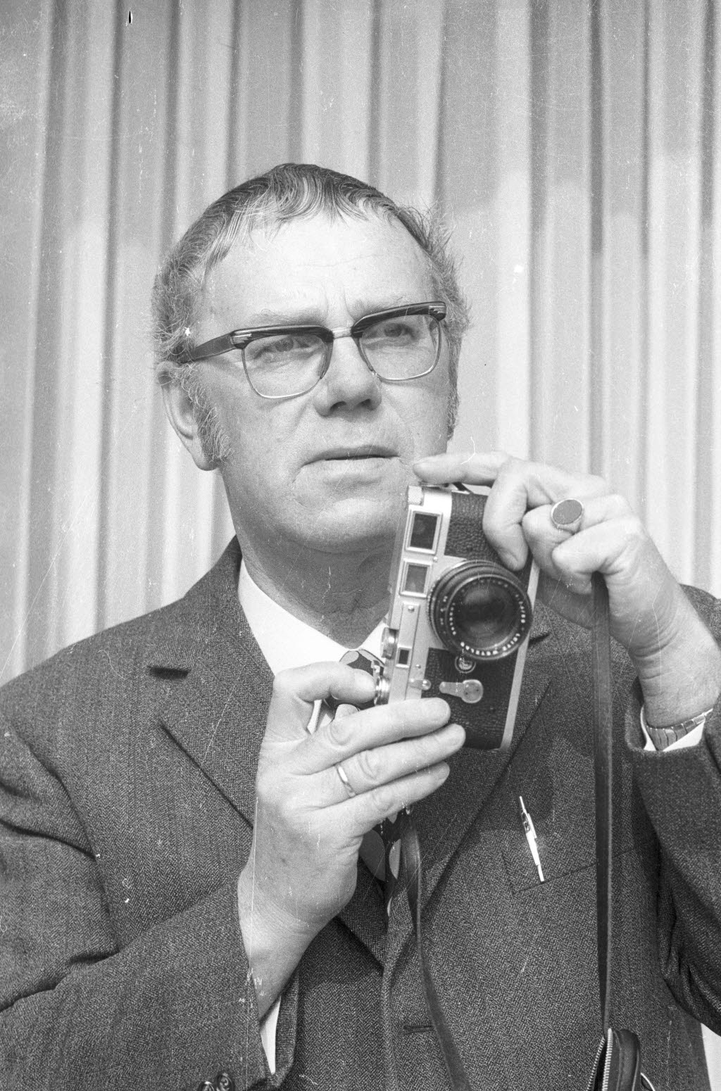 mit Kamera.